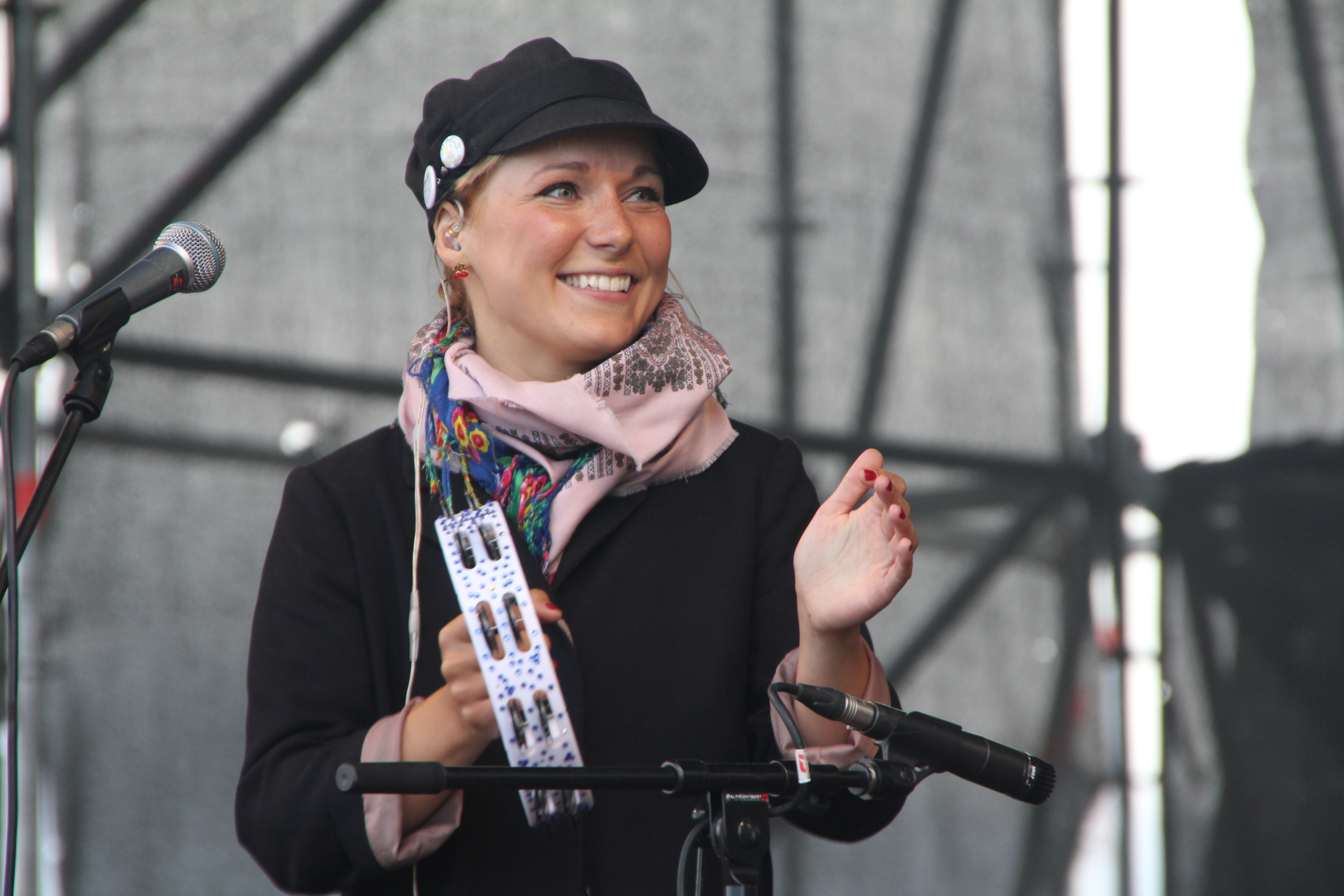 Lenna Kuurmaa Tallinna Merepäevadel